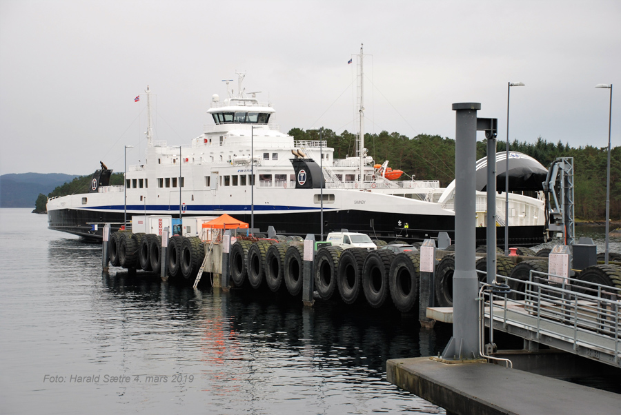 MF «Samnøy» ved Halhjem fergekai den 4. mars 2019.